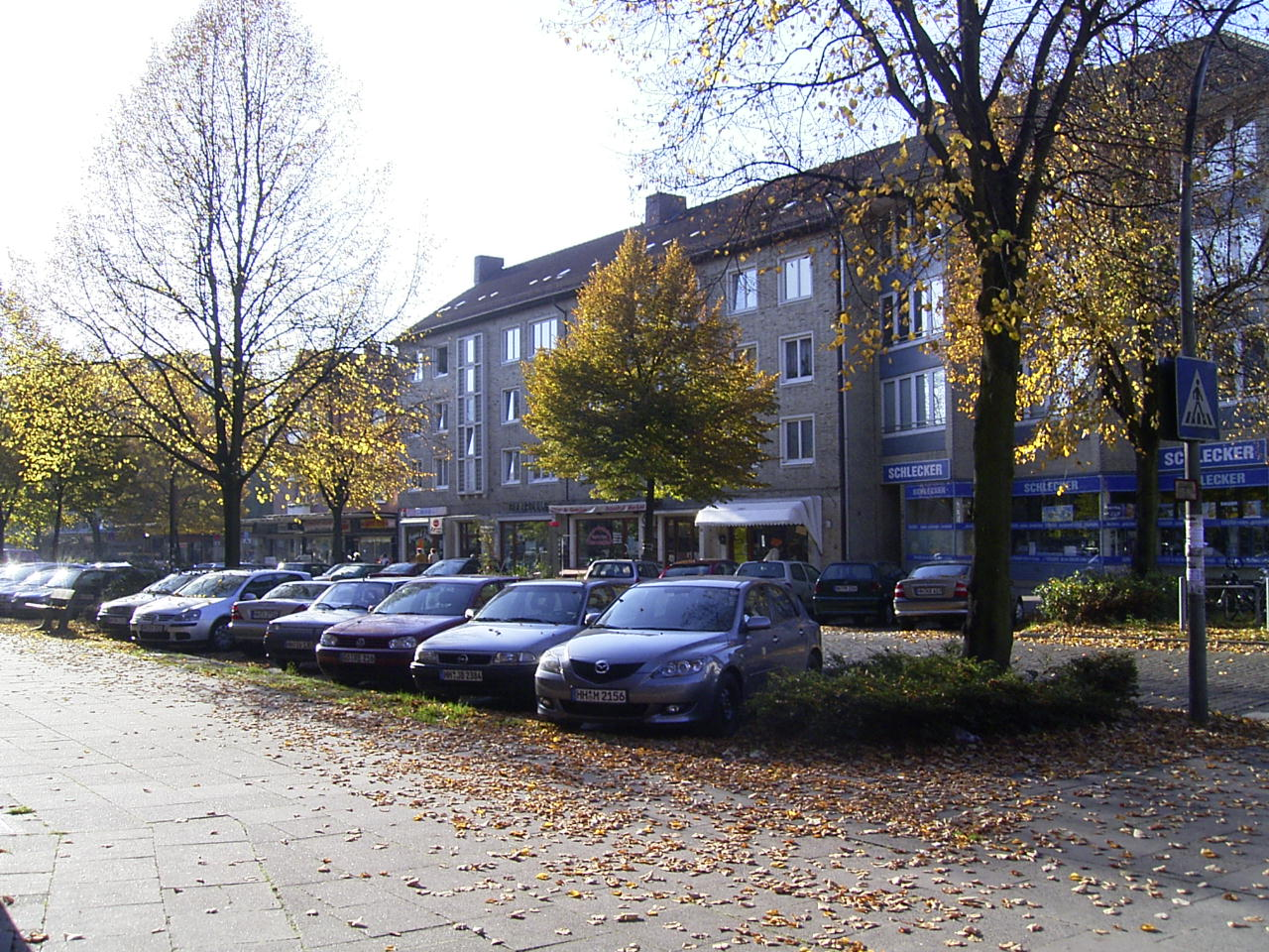 Dithmarscher Straße, die Haupteinkaufsstraße in Hamburg-Dulsberg. Im ehemaligen Schlecker-Markt befindet sich inzwischen eine Kindertagesstätte.